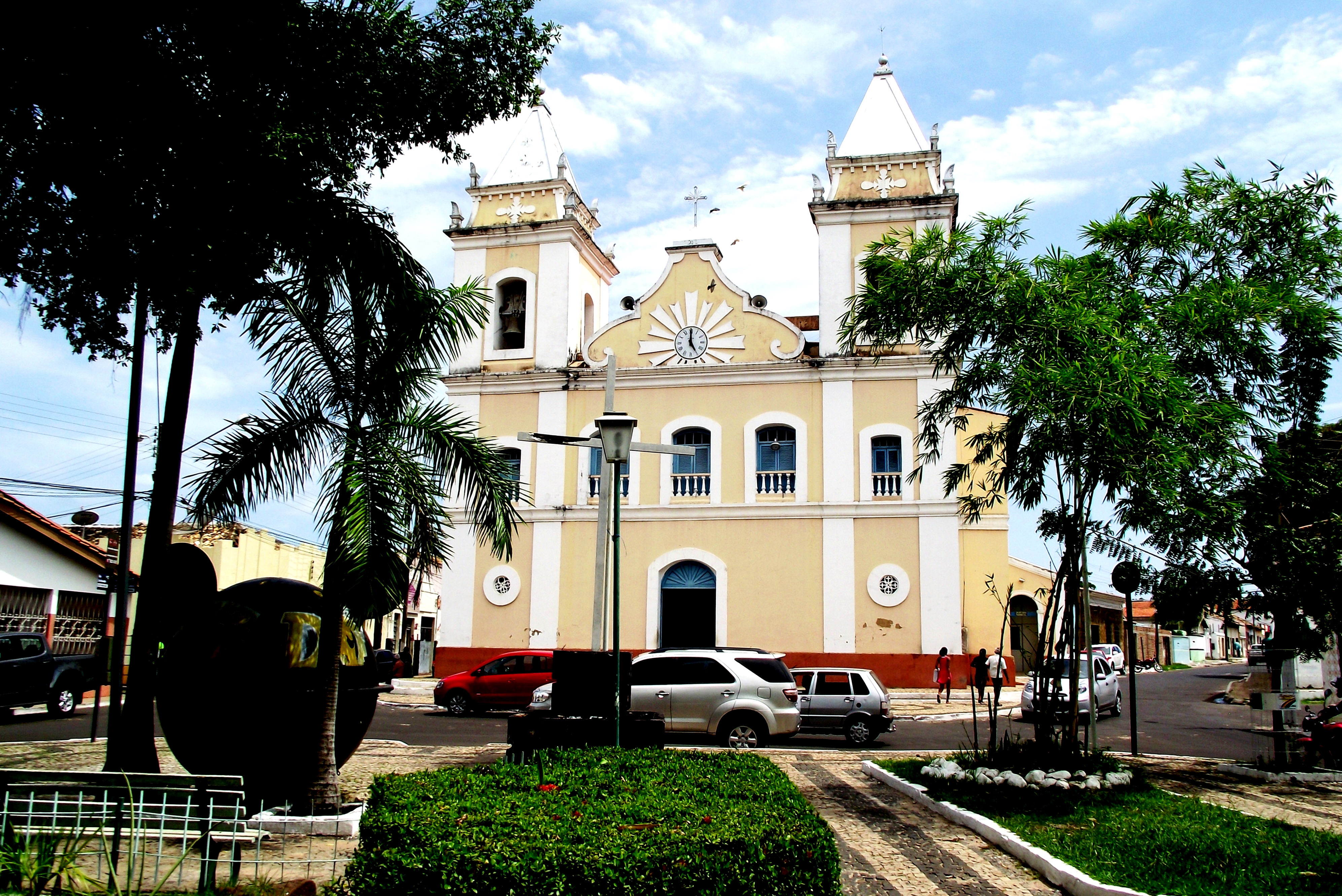 Igreja de São Benedito. Centro histórico de Caxias Maranhão.